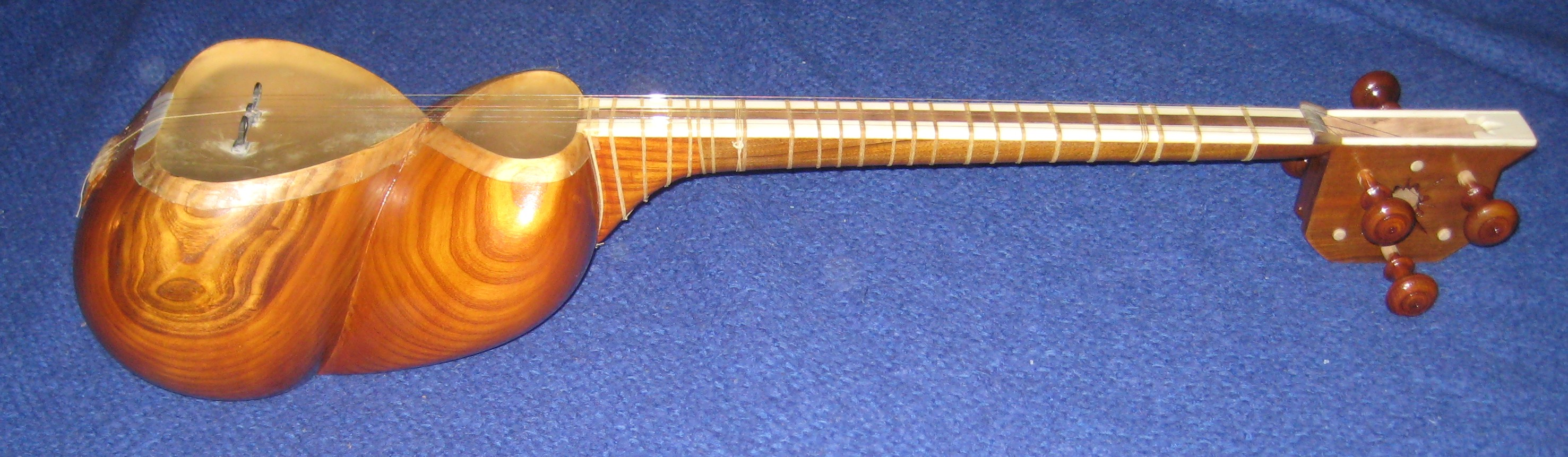 Tar